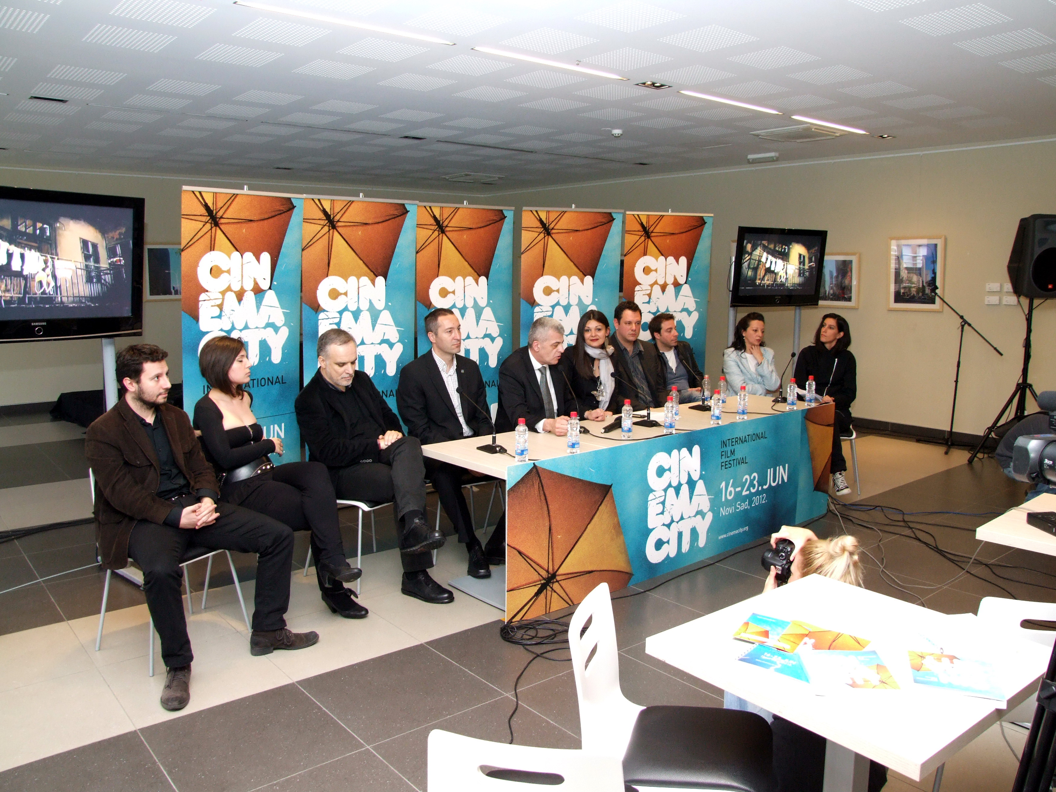 Promocija festivala Cinema City 2012. godine.